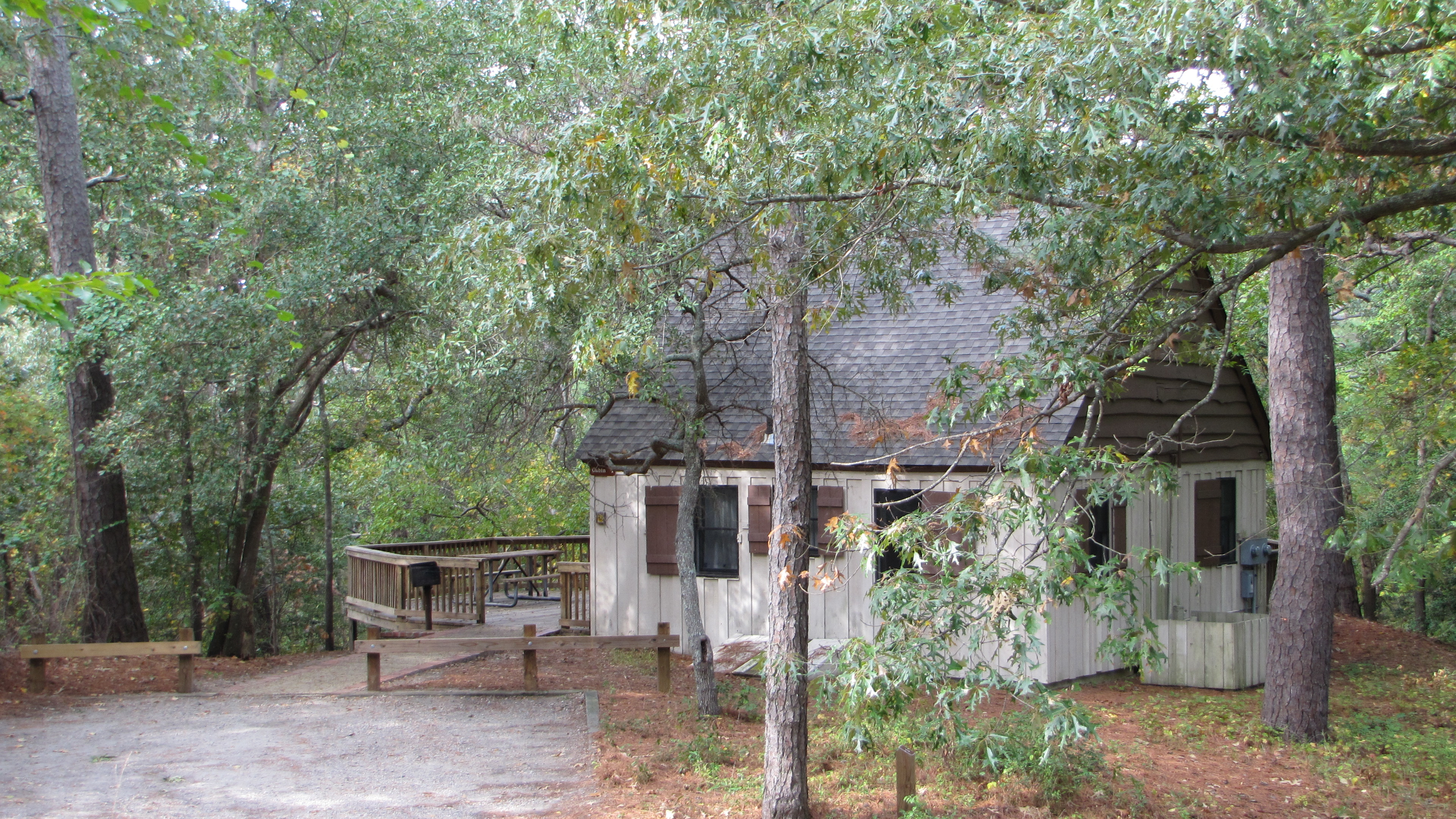 Cabin 1